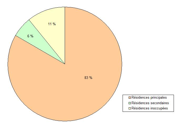 Occupation des logements à Sarton (Pas-de-Calais, France).